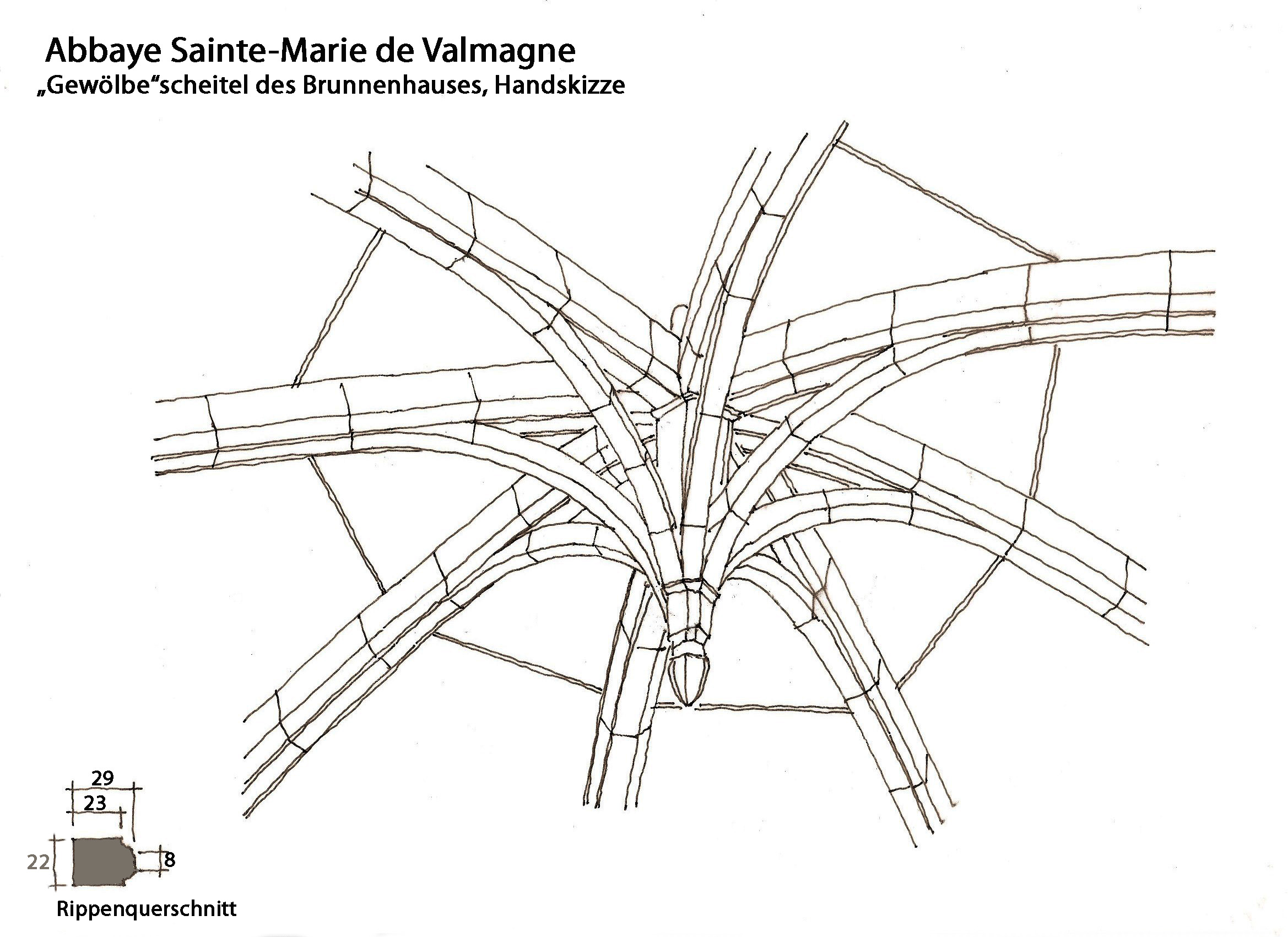 Abbaye de Valmagne, "Gewölbe"scheitel Brunnenhaus, Handskizze